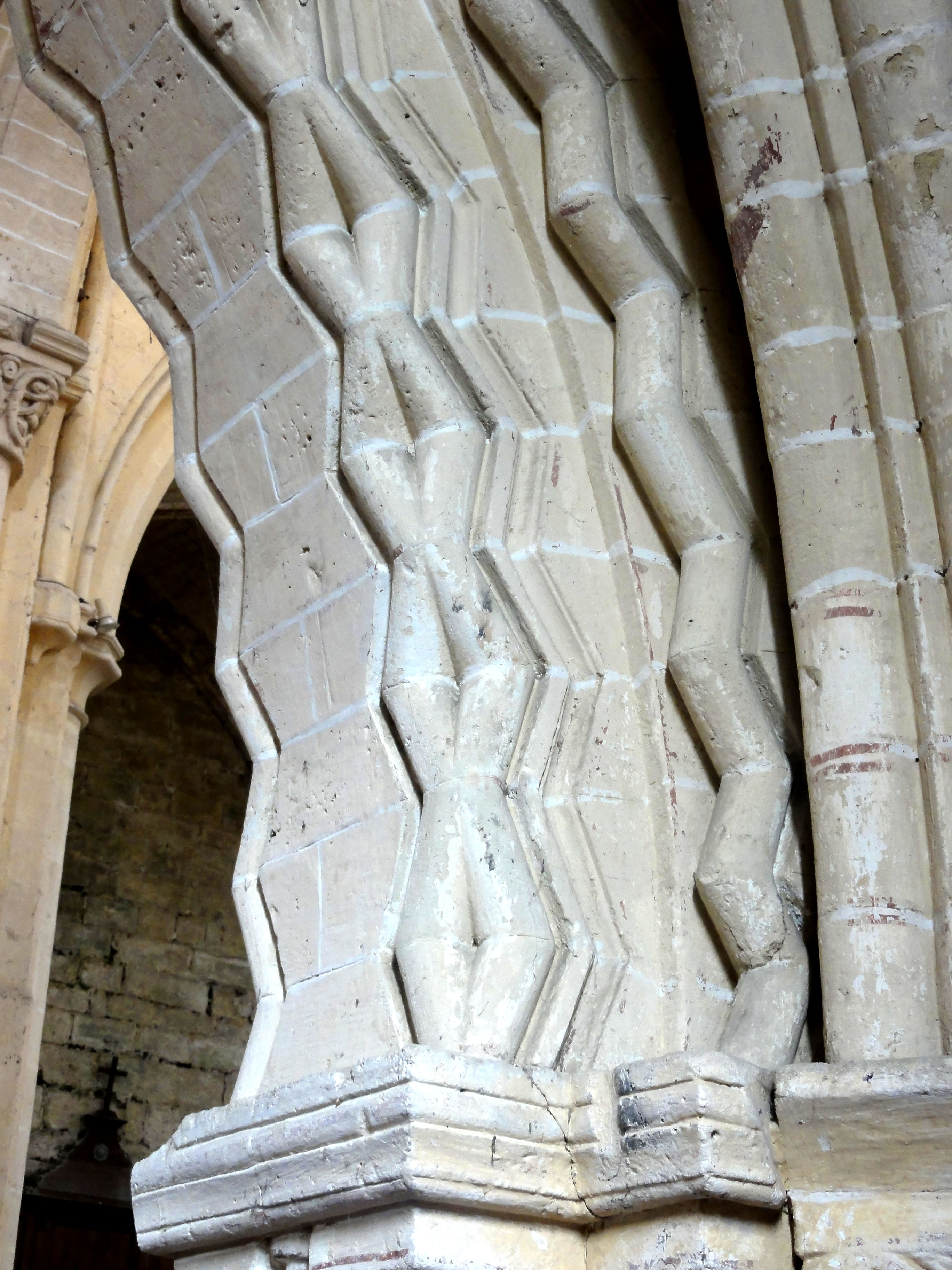 Grandes arcades du sud, bâtons brisés.